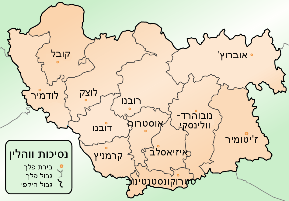 Wolhynien Fürstentum